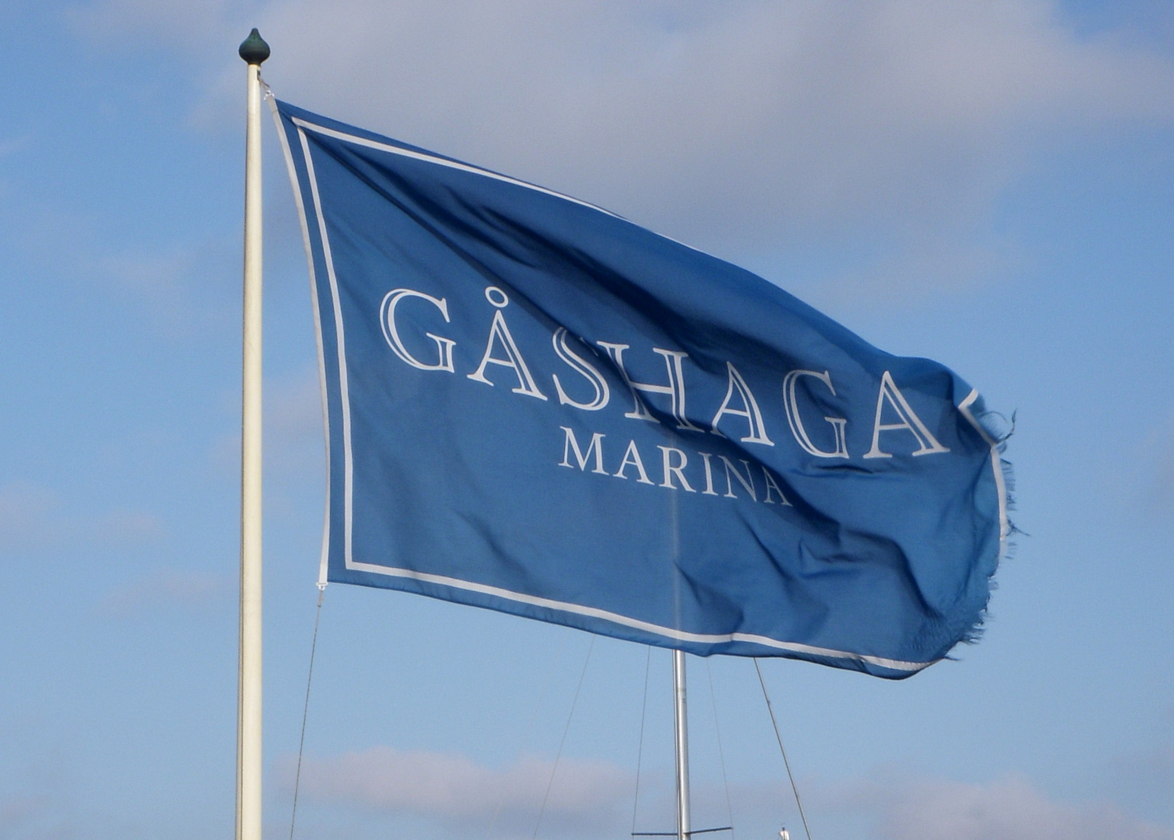 Gåshaga marina på Lidingö